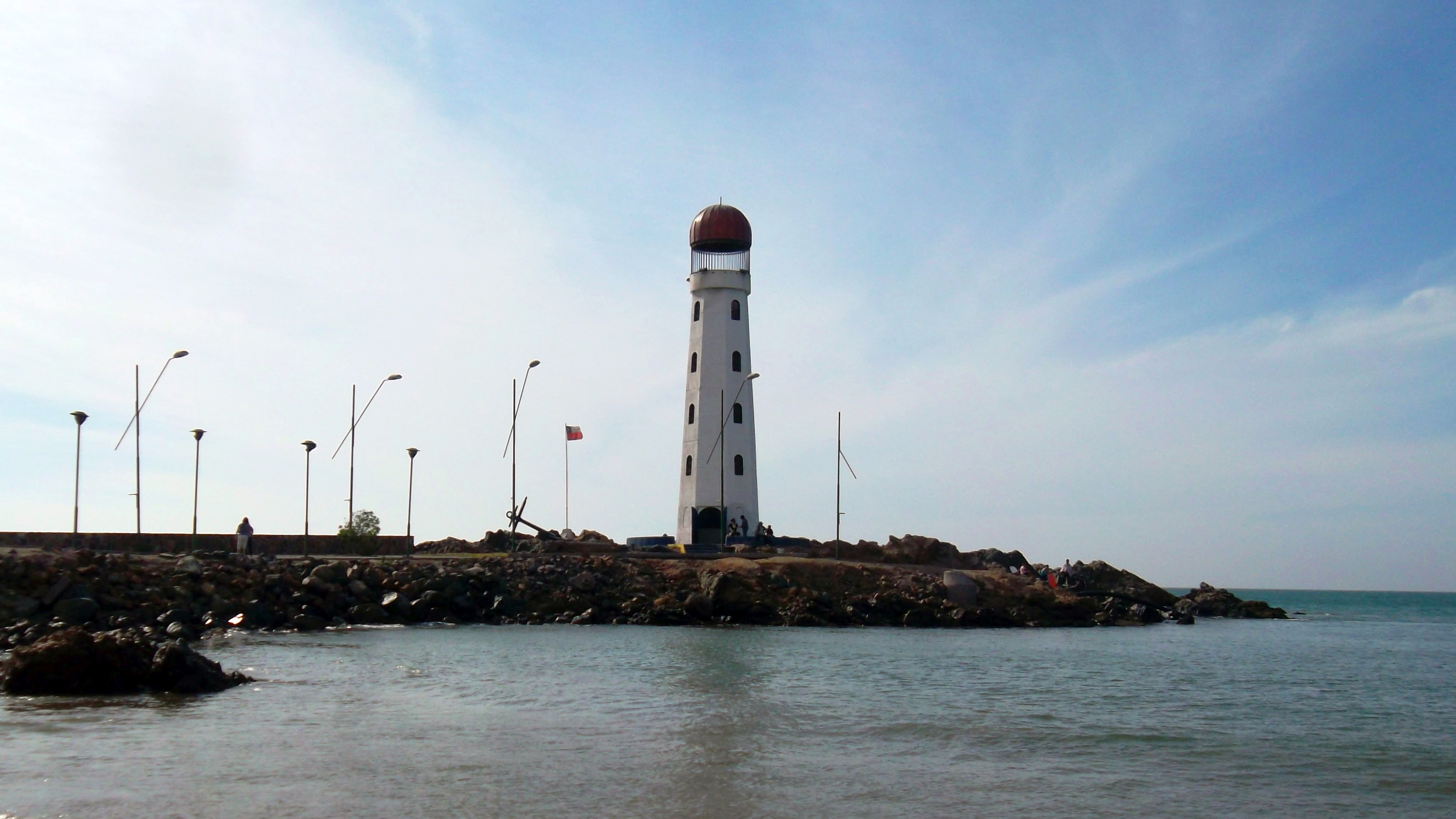 HUASCO - FORO DESDE PLAYA GRANDE